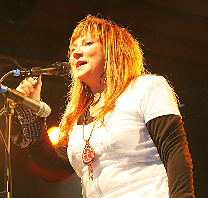 Mari Boine opptrer på Riddu Riddu-festivalen 2006